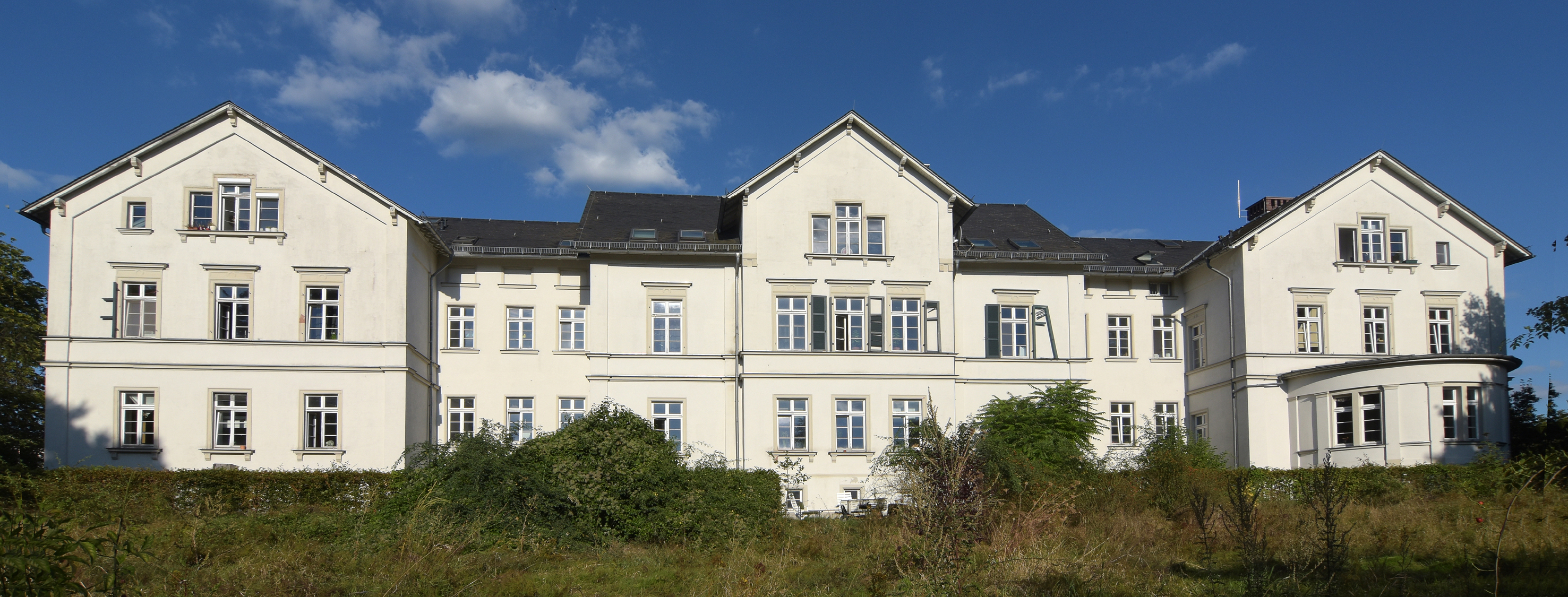 Unterschiedliche Nutzung, zuerst Heilanstalt, dann polizeipräsidium, jetzt Studentenwohnheim